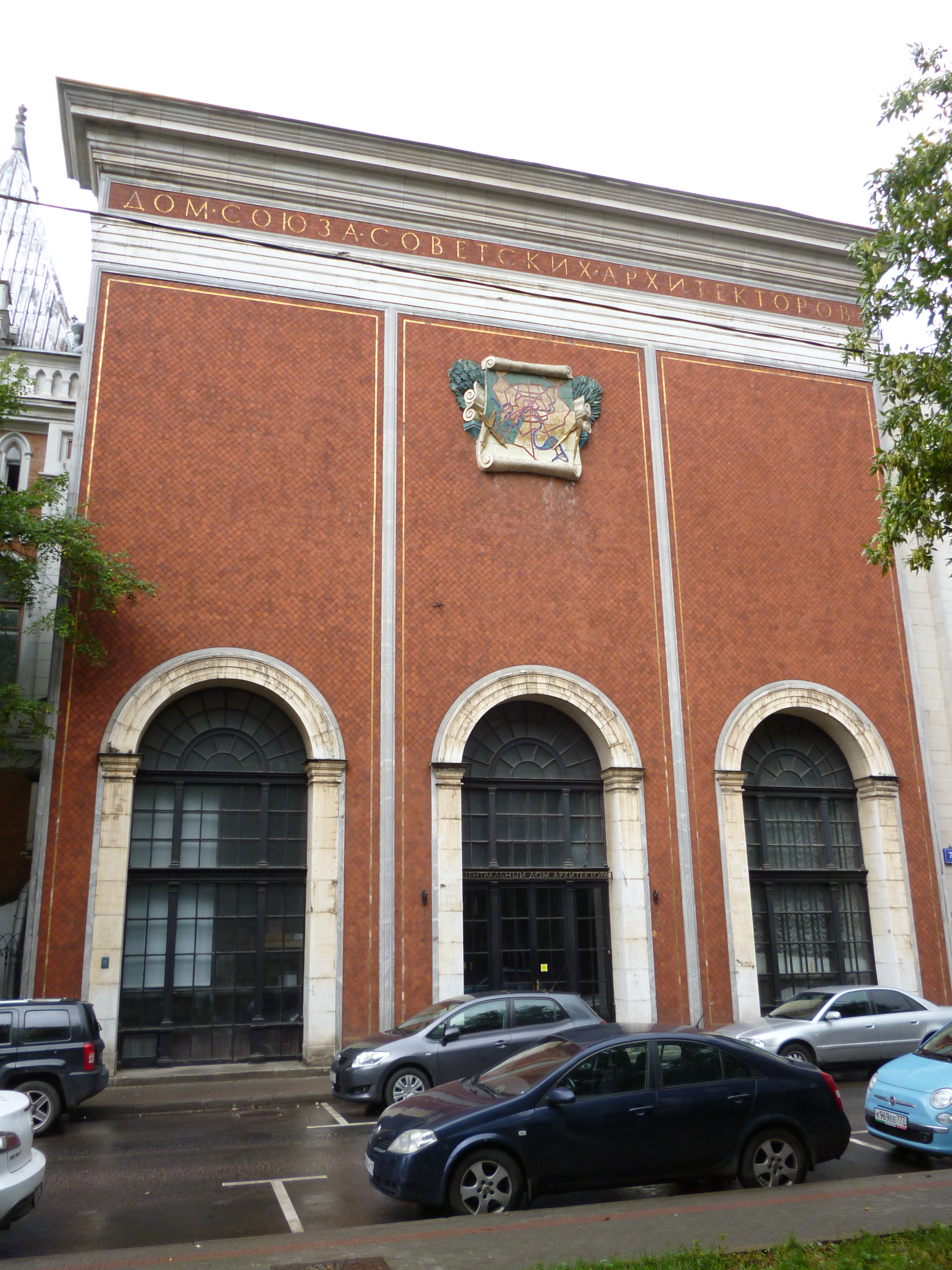 Особняк - Дом архитектора: Гранатный пер., дом 7, строение 1, Пресненский, Центральный округ, Москва